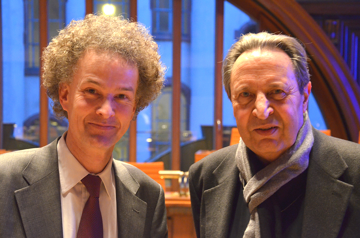 Ein Bild(ungs-)Dokument vom SUMA-Kongress & Award „Wege aus der Überwachungskatastrophe“ 2014 im Neuen Rathaus von Hannover ...